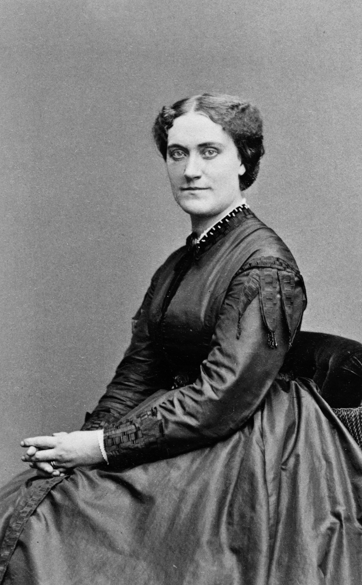 Louise Michaëli, sångare vid Kungliga Operan. Odaterat porträtt